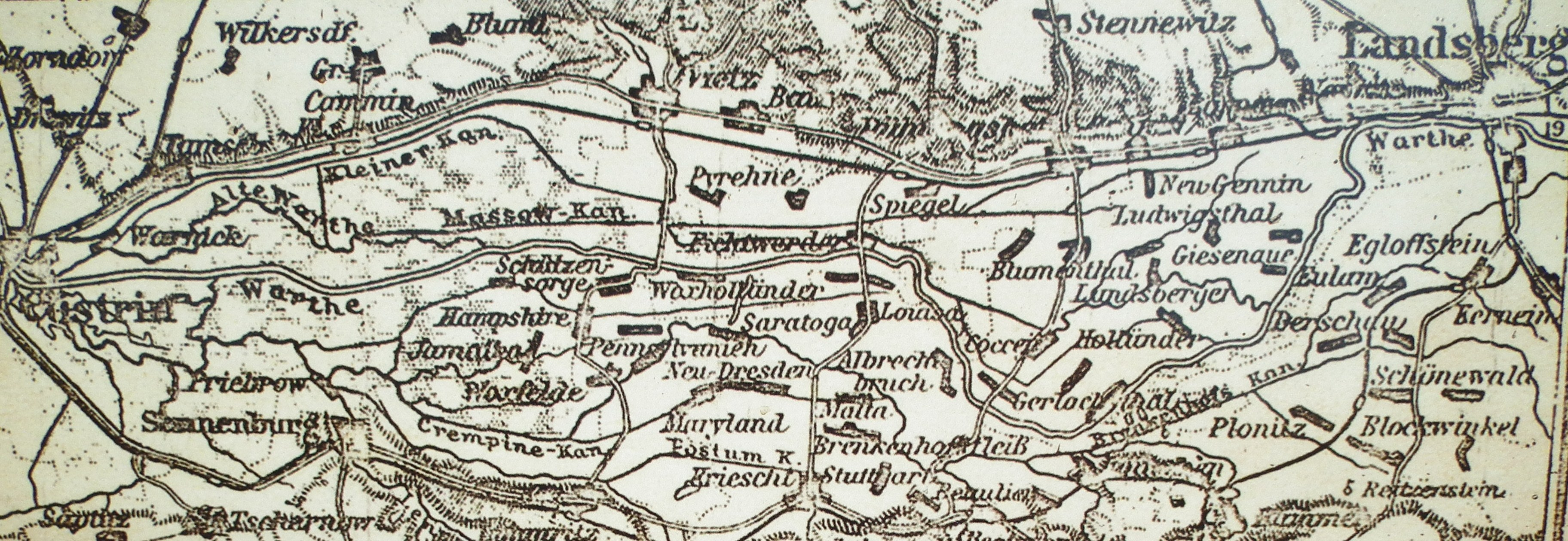 Mapa błot nadwarciańskich z 1780r. (z tablicy informacyjnej we wsi Jamno).